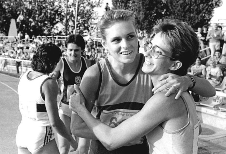 ADN-ZB-Koard-21.7.89-Neubrandenburg: 40. DDR-Leichtathletik-Meisterschaften-Die favorisierte Juniorenweltmeisterin auf den Sprintstrecken von 1989, Katrin Krabbe (SC Neubrandenburg, 2.v.r.), siegte im Finale über 100 m in 11,20 s. Mit ihr freut sich Heike Morgenstern (ASK Vorwärts Potsdam,r.), die auf den siebenten Platz kam. Kerstin Behrendt (SC OHfK Leipzig, 2.v.l.) und Weltmeisterin Silke Möller (SC Empor Rostock,l.) belegten die Plätze nach der Siegerin.